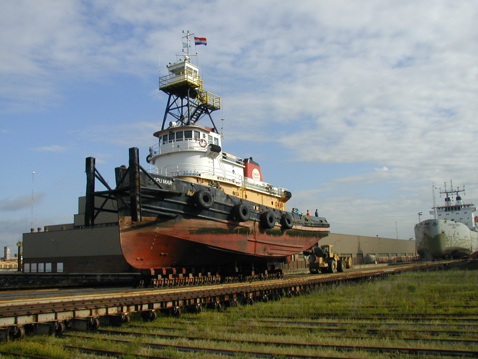 Dry dock yard TANDANOR at Buenos Aires. Instalaciones del astillero TANDANOR en Buenos Aires